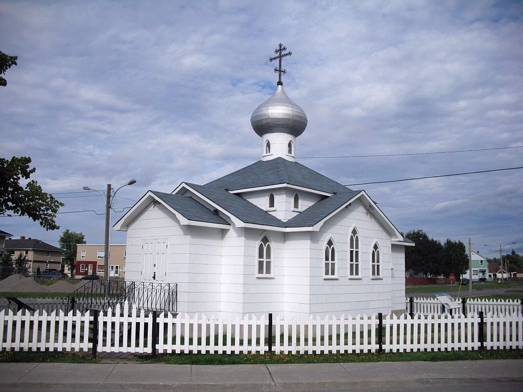 Vue sur la petite église orthodoxe de Val-d'Or (Québec, Canada), bâtie par une communauté de travailleurs immigrants au XXe siècle.